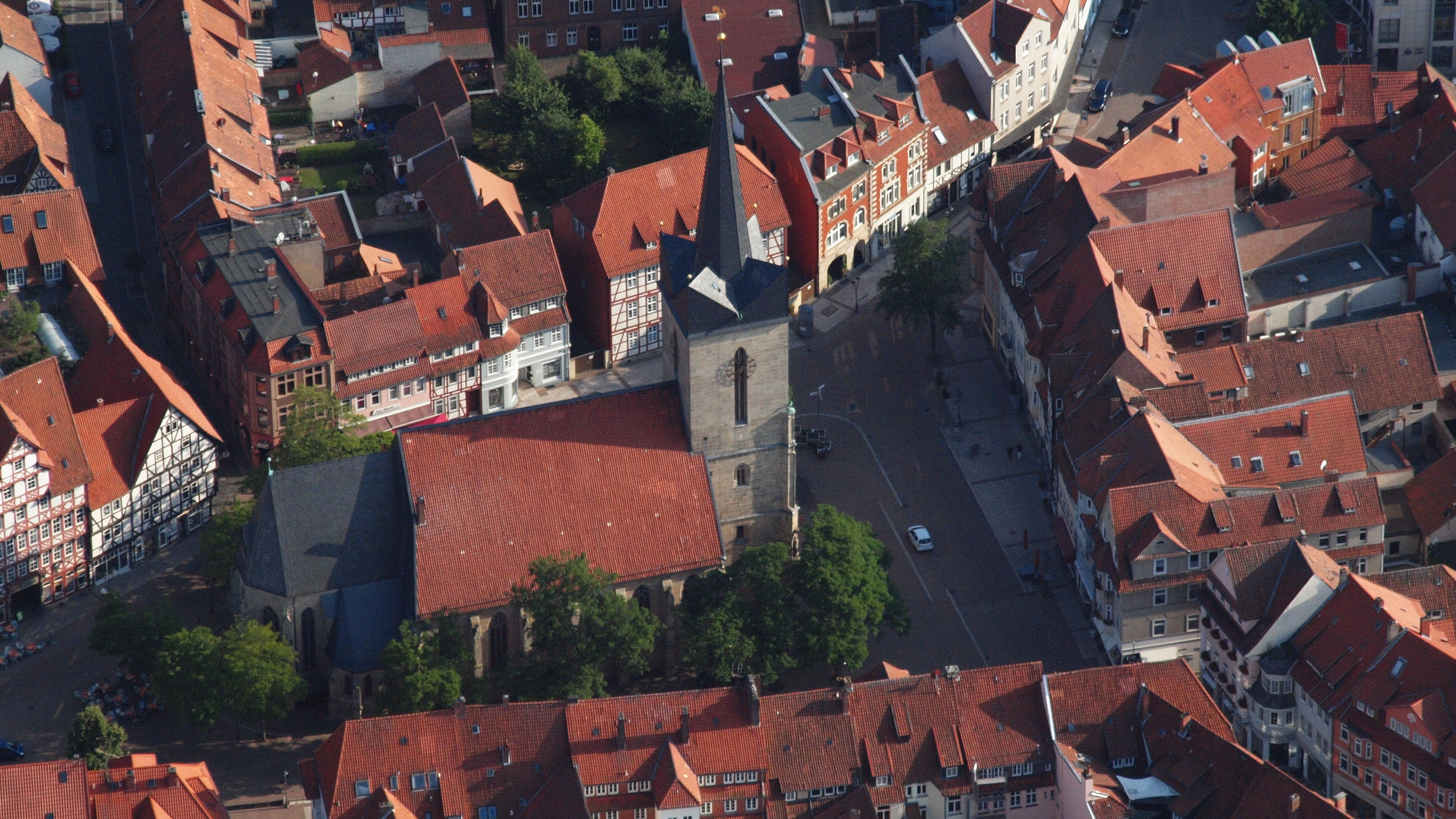 evangelische Kirche St. Servatius, Duderstadt: Luftaufnahme